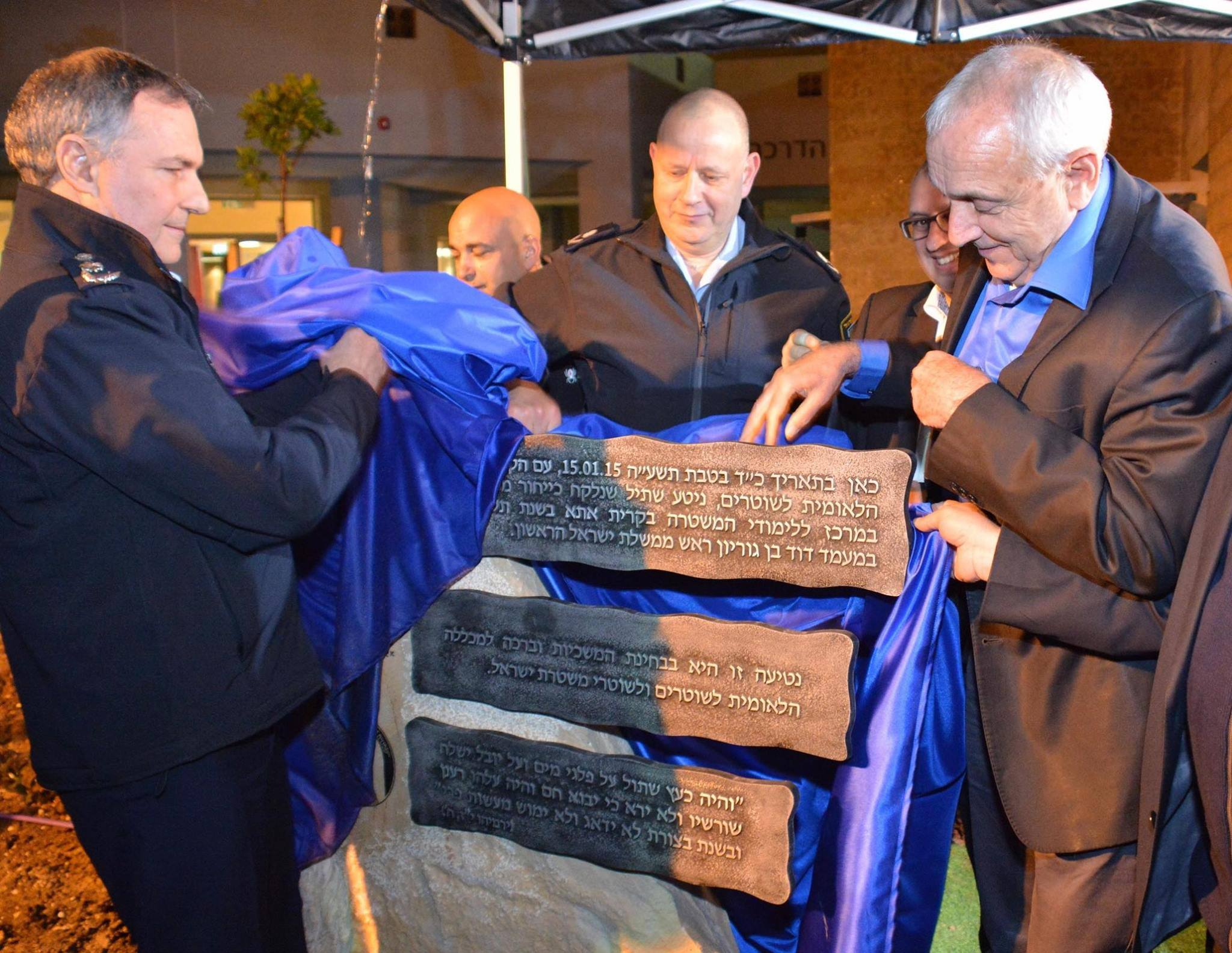 טקס חניכת המכללה הלאומית לשוטרים